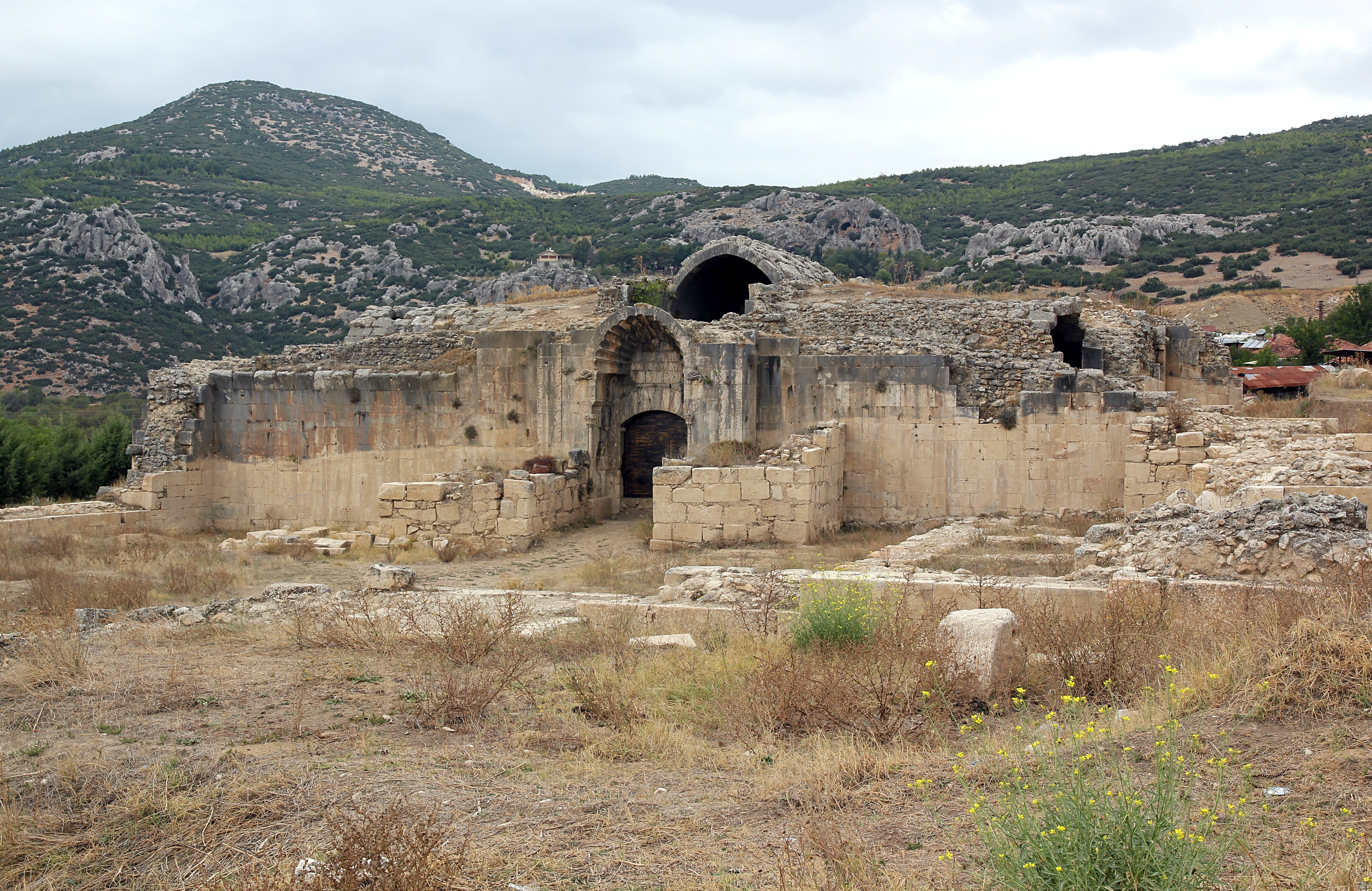 İncir Han, seldschukische Karawanserei bei Bucak in der Südwesttürkei